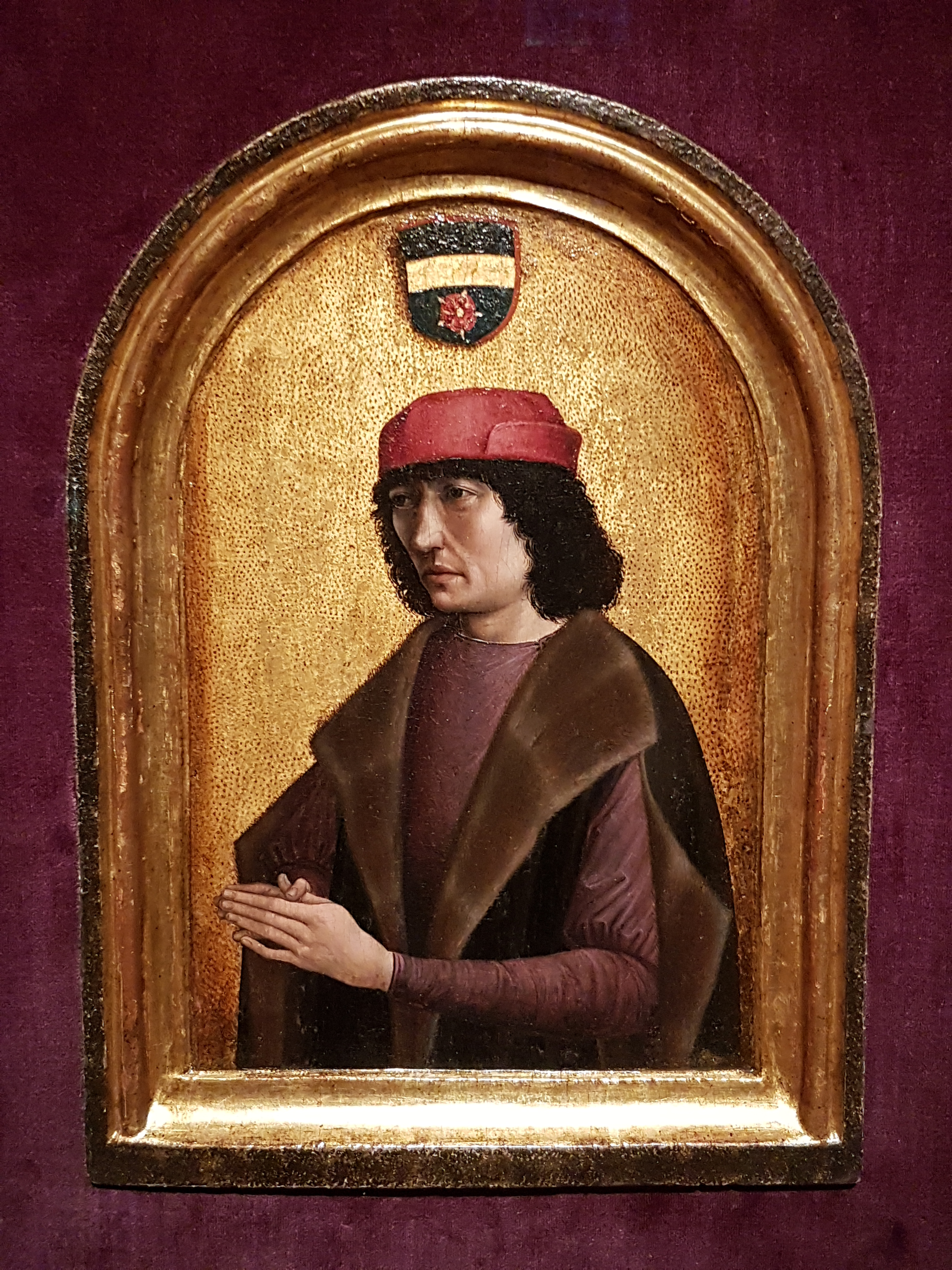 Portret door onbekende meester van de Mechelse humanist Hieronymus van Busleyden. This photo of movable heritage has been taken in the Flemish Region